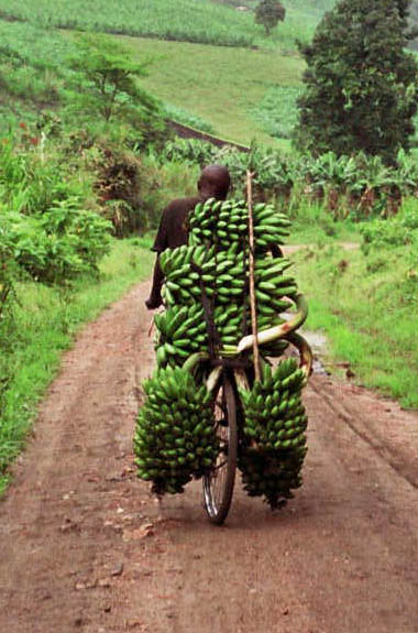 Banana carrier near Fort Portal, Uganda